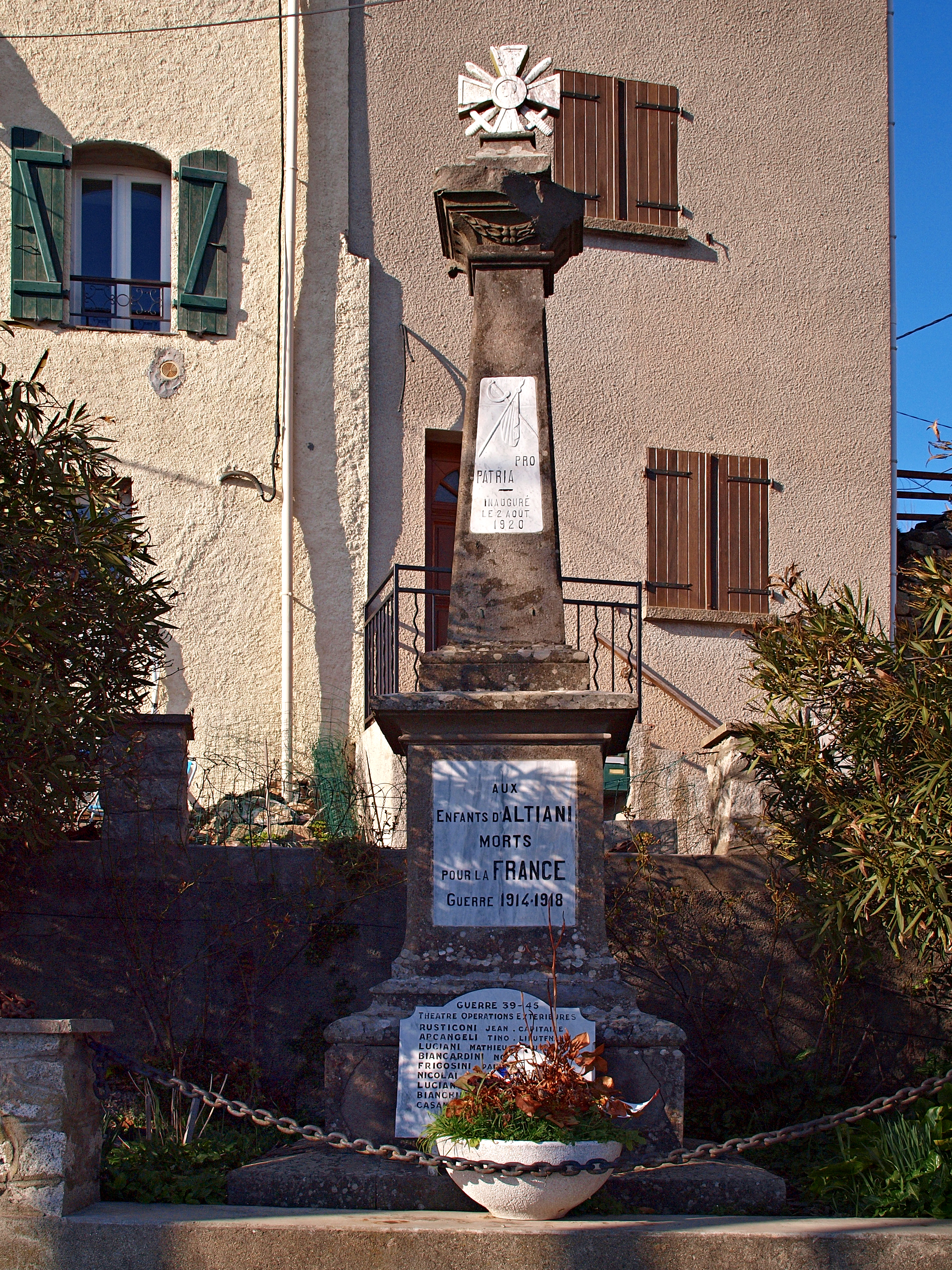 Altiani (Corse) - Monument aux morts